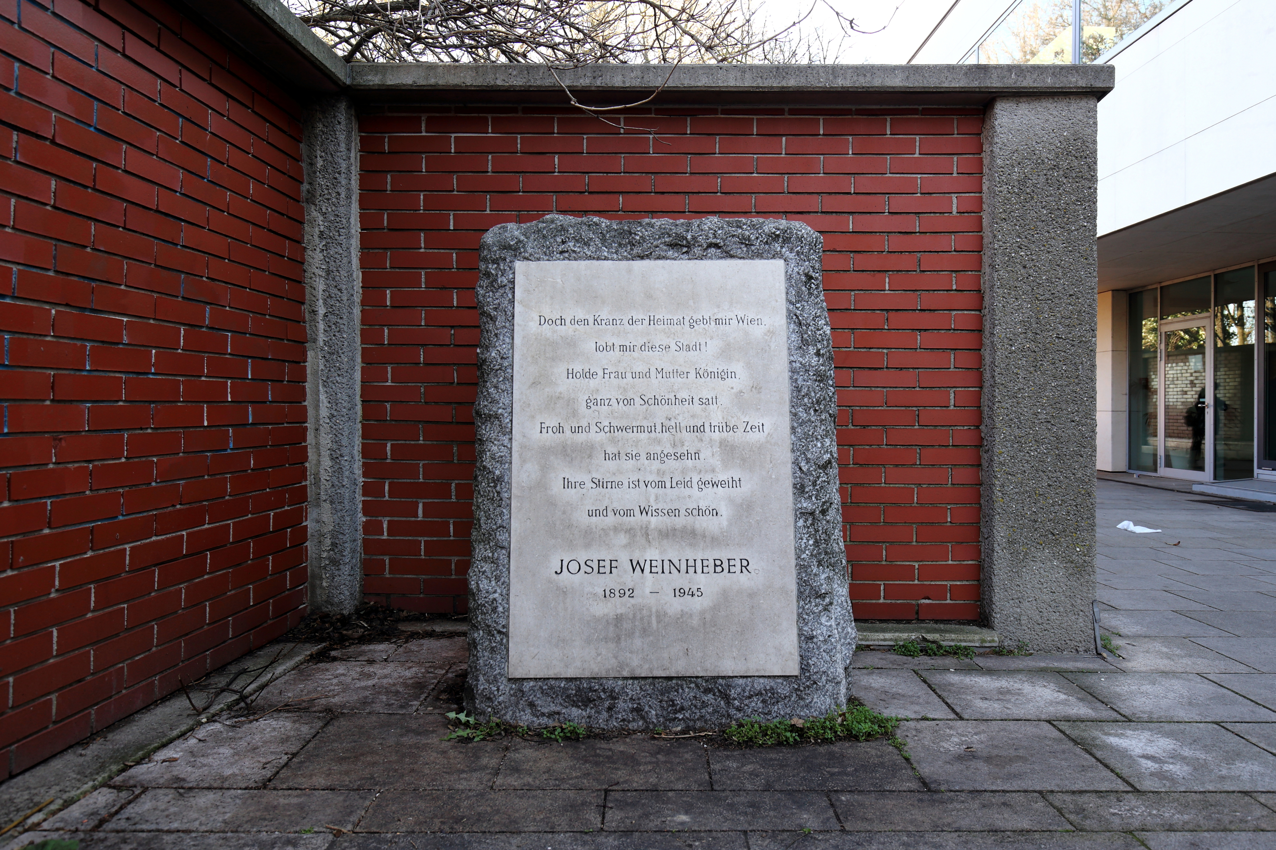 Der Josef-Weinheber-Gedenkstein auf dem Kahlenberg im 19. Wiener Gemeindebezirk Döbling. In Gedenken an den Lyriker Josef Weinheber wurde im Jahr 1964 von der Weinheber-Gesellschaft auf der damals neuen Terrasse des Kahlenberges der Gedenkstein, ein roh behauener, hochrechteckiger Pultstein, errichtet. Die Inschriftentafel zitiert die letzten Verszeilen eines Huldigungsgedichtes an die Stadt Wien.